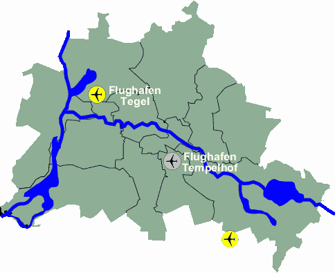 Beschreibung: Lage der Berliner Flughäfen Quelle: Selbsterstellt mithilfe unten erläuterter Grundlage --hedavid Copyright: GNU/FDL Eine Grundlage der Grafik war die mit Copyleft (1) versehene SVG-Grafik von Michael Klockmann ( 01:07, 1. Mär 2004 Hedavid 484 x 395 (11562 Byte) (Lage der Flughäfen in Berlin)